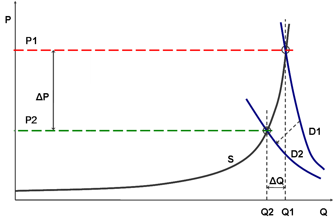 Equilibrium price under demand inelastaic and elastic demand